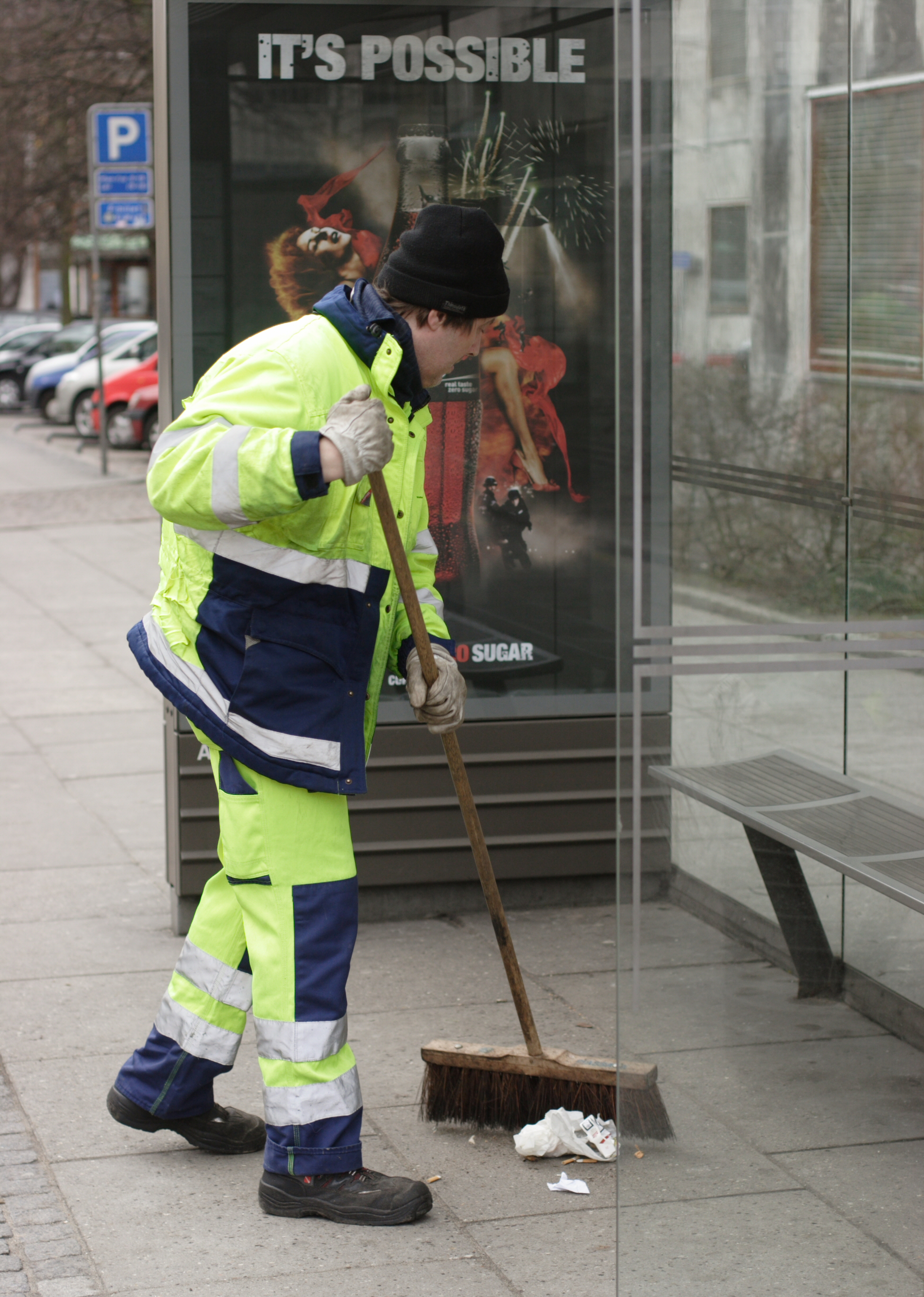 Gadefejer fejer i et buslæskur i Park Allé i Århus